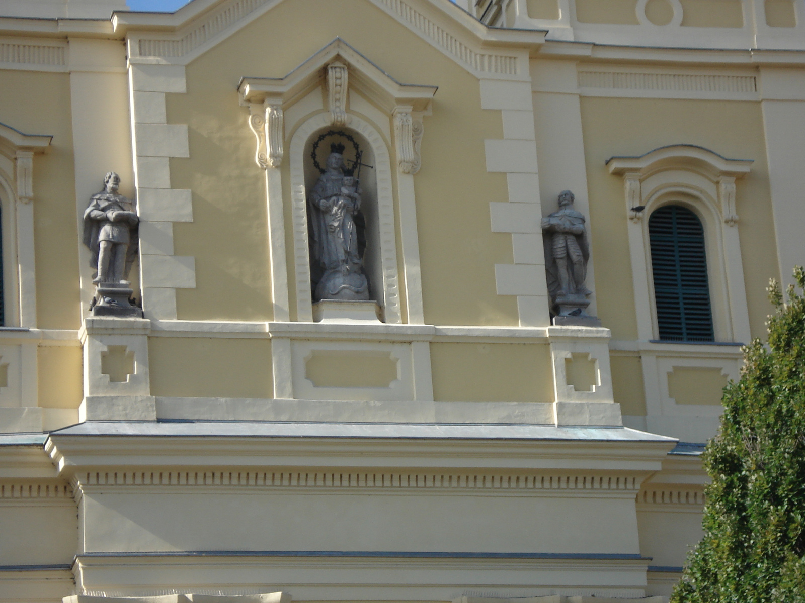 Alsóvárosi r.k. plébániatemplom (Mindszent) (Miskolc, Mindszent tér 2.) This is a photo of a monument in Hungary. Identifier: 2956